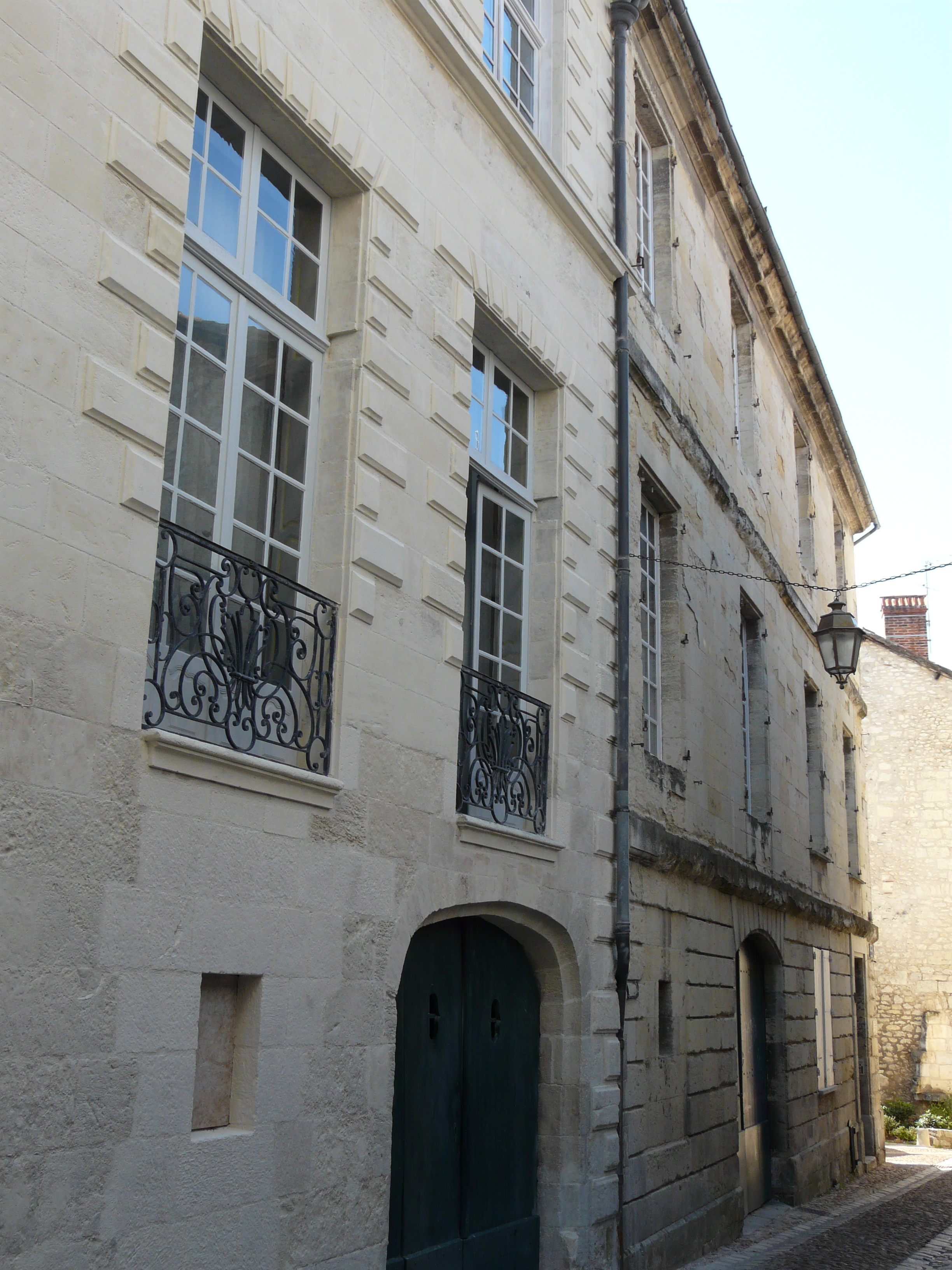 L'hôtel de Nervau (au second plan), 14 rue du Plantier, Périgueux, Dordogne, France.